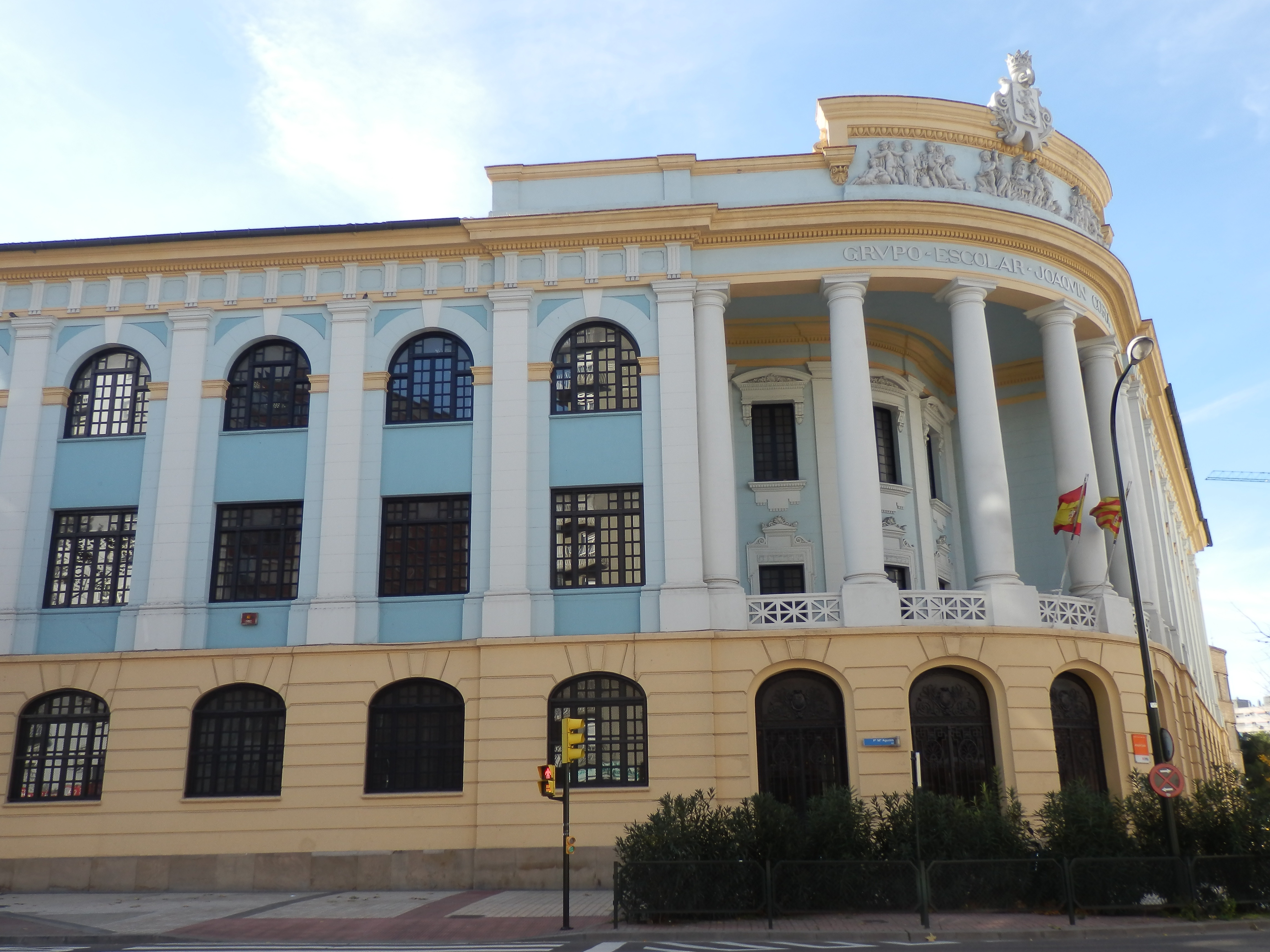 Grupo Escolar Joaquín Costa en la calle General Mayandía de Zaragoza.